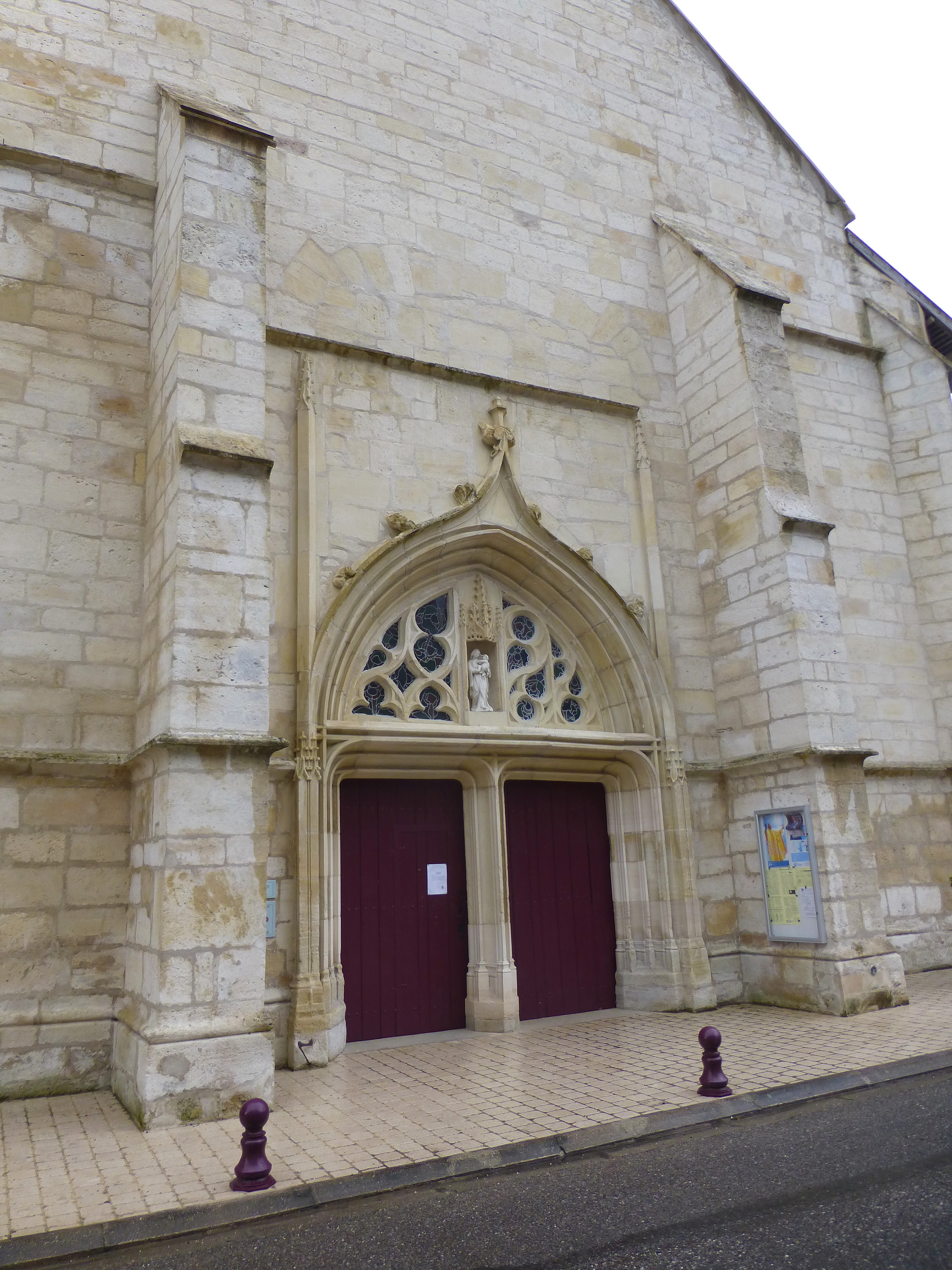 Église Saint-Calixte (MH) de Savonnières-devant-Bar (Meuse)